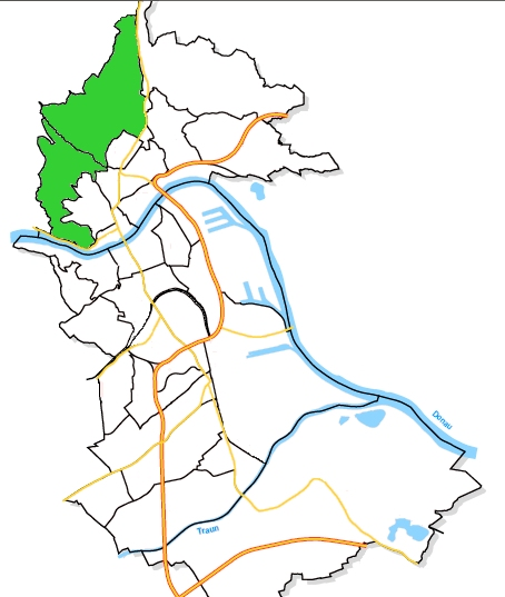 Städtische Bezirke Linz, Stadtteil Pöstlingberg hervorgehoben